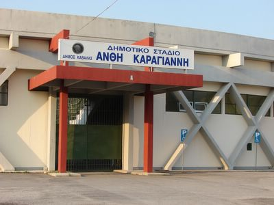 Το Δημοτικό Σάδιο Καβάλας Ανθή Καραγιάννη